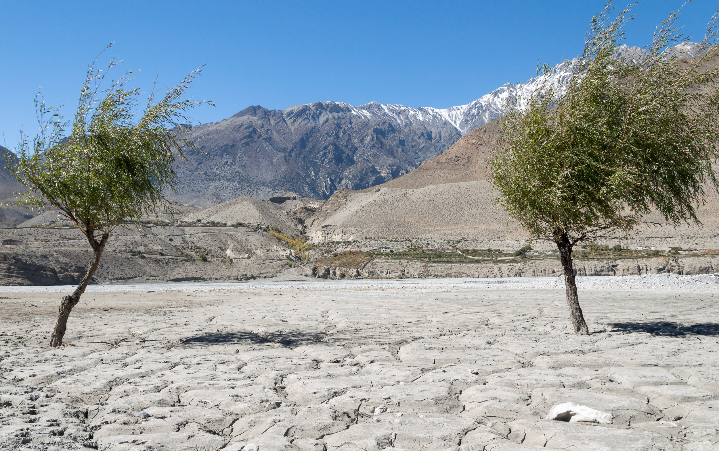 Kali-Gandaki valley / Annapurna Circuit, Nepal